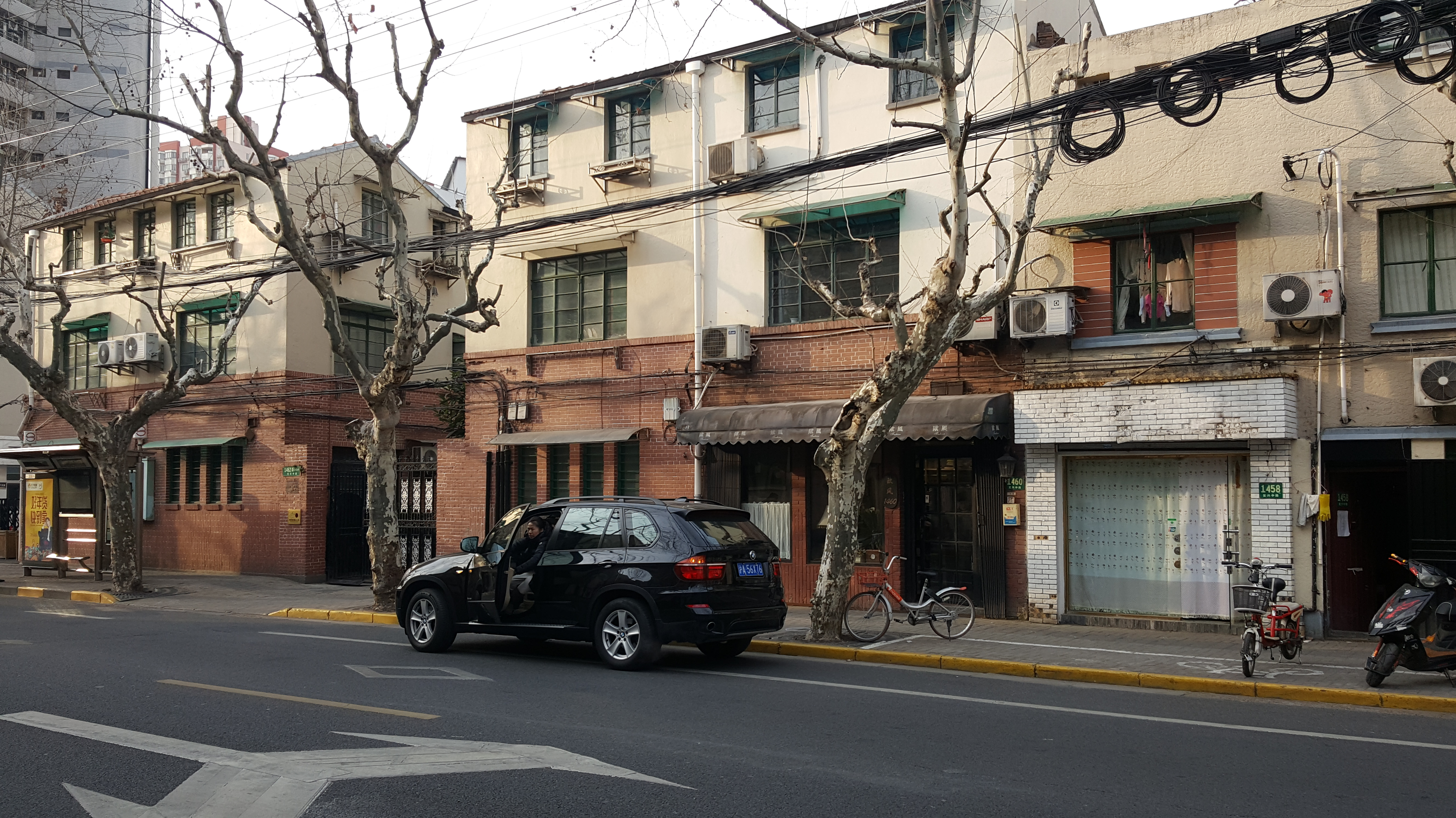 中文（中国大陆）: 复兴中路1462弄原剑桥角公寓